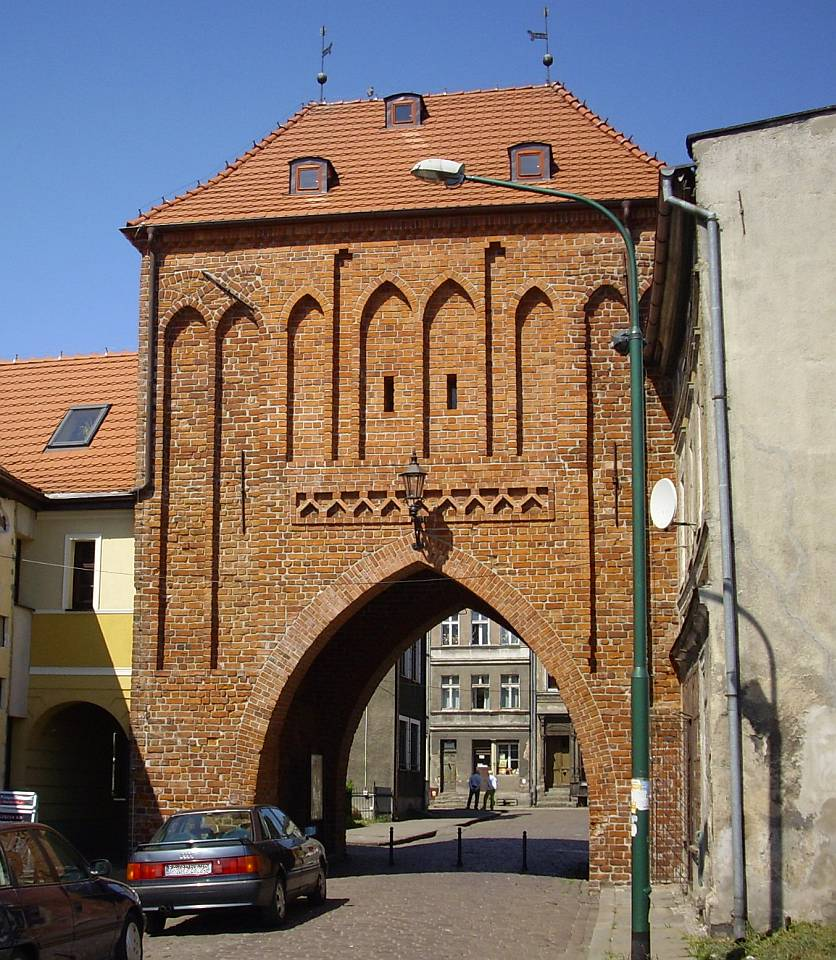 Białogard - Brama Połczyńska. Widok od strony wschodniej.